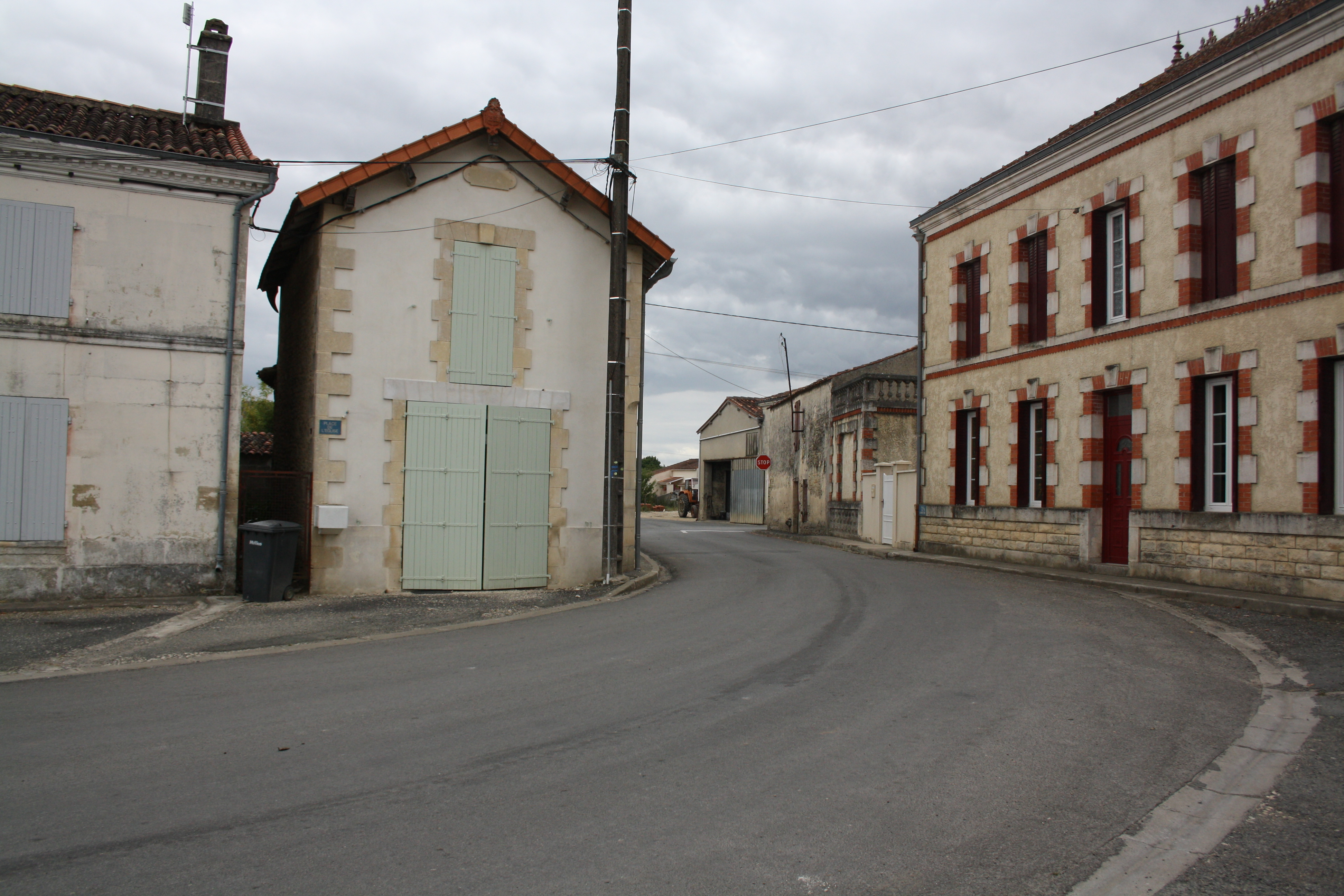 Authon (Charente-Maritime, France).